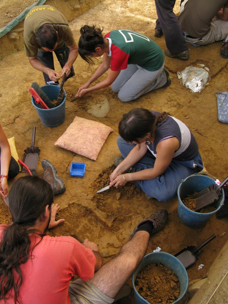 Excavaciones de Irikaitz realizadas en el año 2011